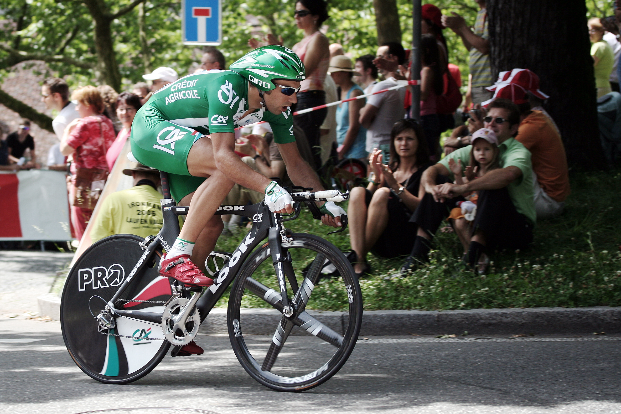 William Bonnet, Bern, Switzerland (Einzelzeitfahren Tour de Suisse 2007)